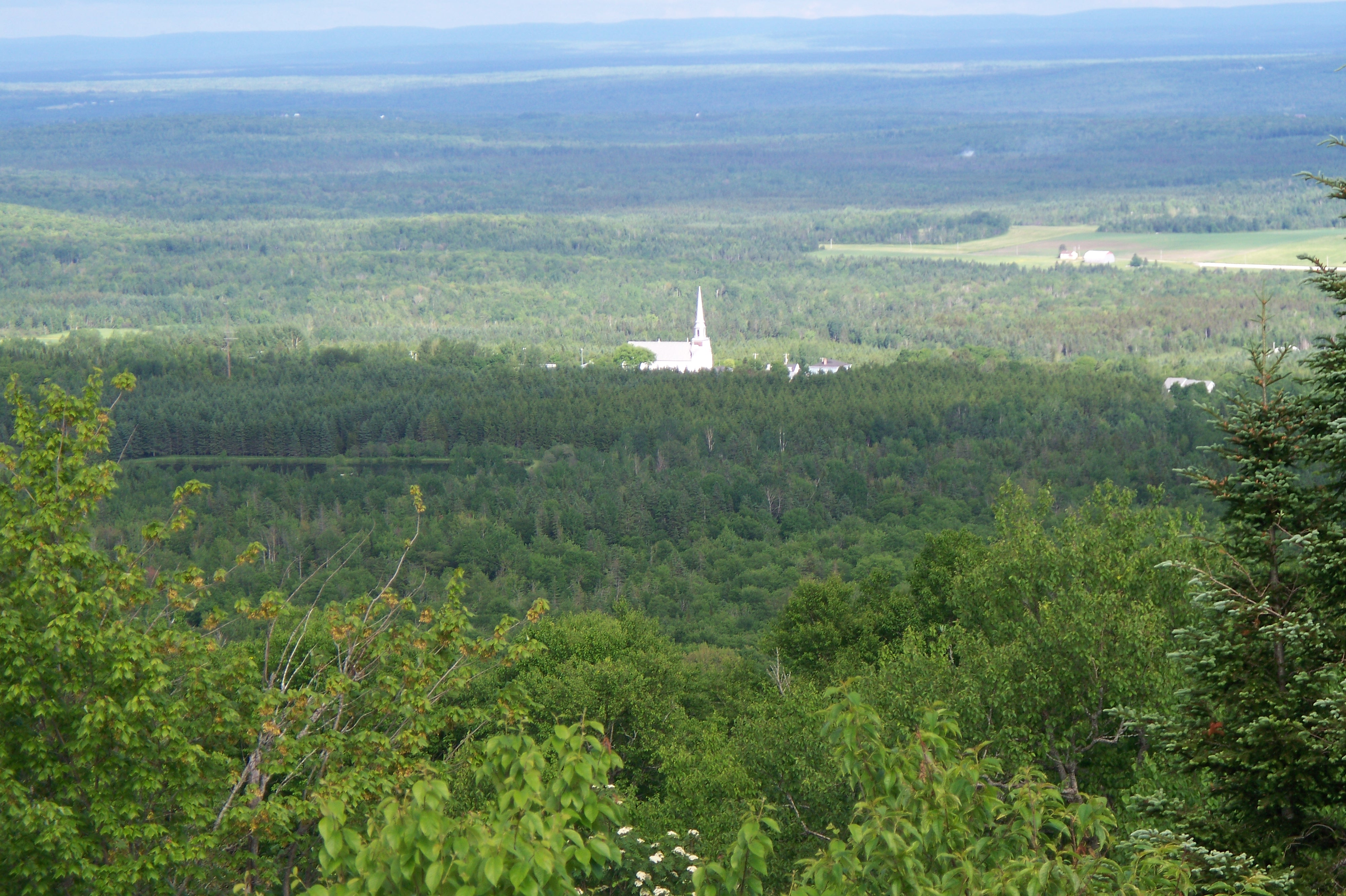 Photo de Sainte-Sabine de bellechasse